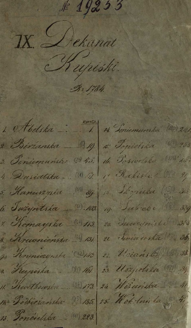 Kupiškio dekanato parapijų aprašymas. 1784 m.